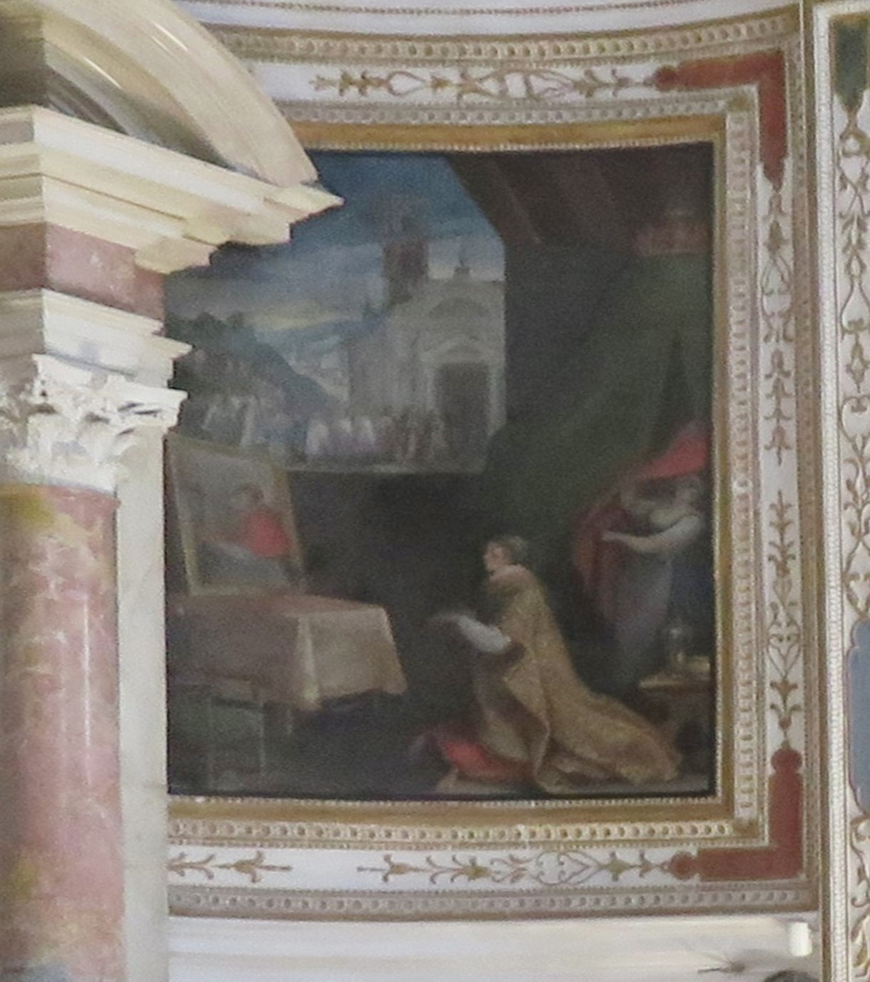 Alfonsina Gonzaga di Novellara nell’affresco a destra nell’altare di San Carlo all’interno dell’Inviolata a Riva del Garda. Alfonsina è inginocchiata in preghiera mentre all’esterno in primo piano l’Inviolata in costruzione ed una processione